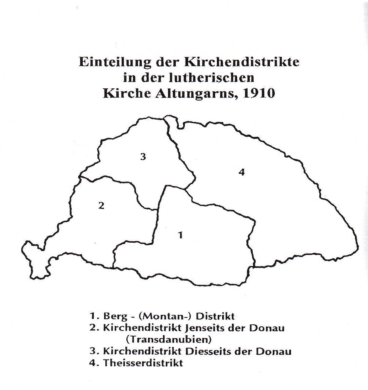 aus Tibor Fabiny: Geschichte der lutherischen Kirche in Ungarn